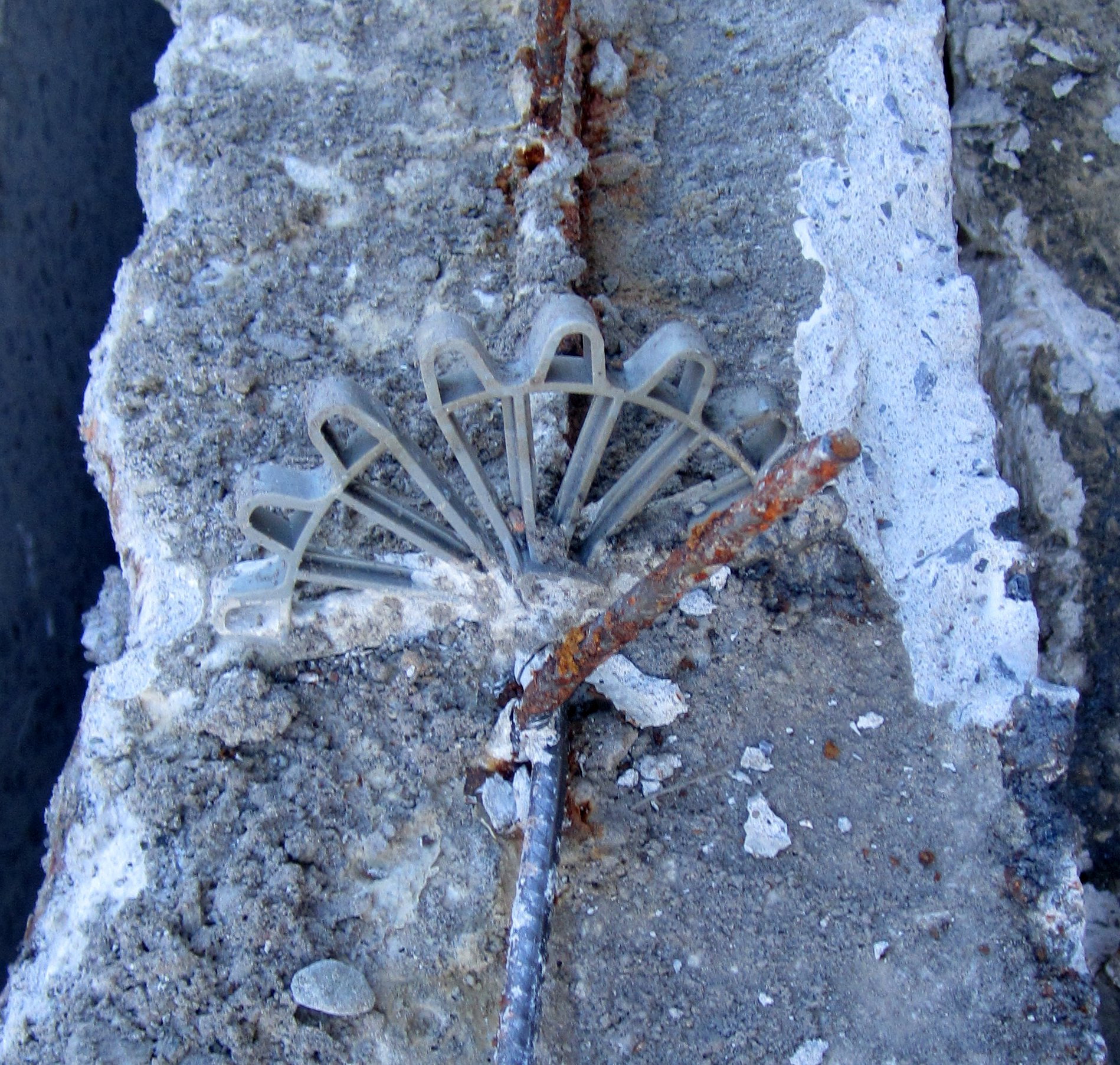 Abstandhalter an der Bewehrung in Stahlbeton (Allerdings ist die Bewehrung in der neutralen Faser wahrscheinlich recht sinnfrei...)